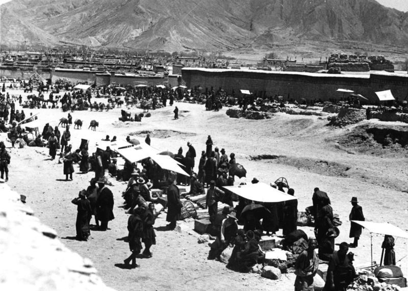 Schigatse, Bazar